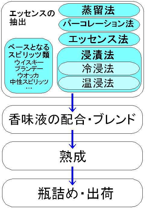 リキュールの製造工程を図式化。